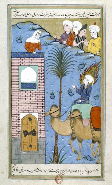 Arrivée de Mahomet à La Mecque - Ishâq al-Nishâpûrî, Qesas al-anbiya (Histoires de prophètes), Iran, Qazwin